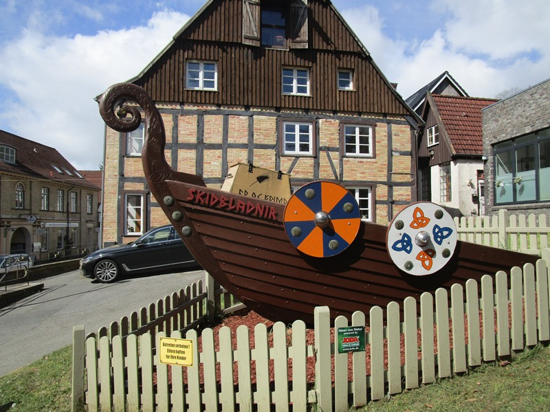 Mytesti i Slesvig-Lolfod, her: Gengivelse af gudeskibet Skidbladner